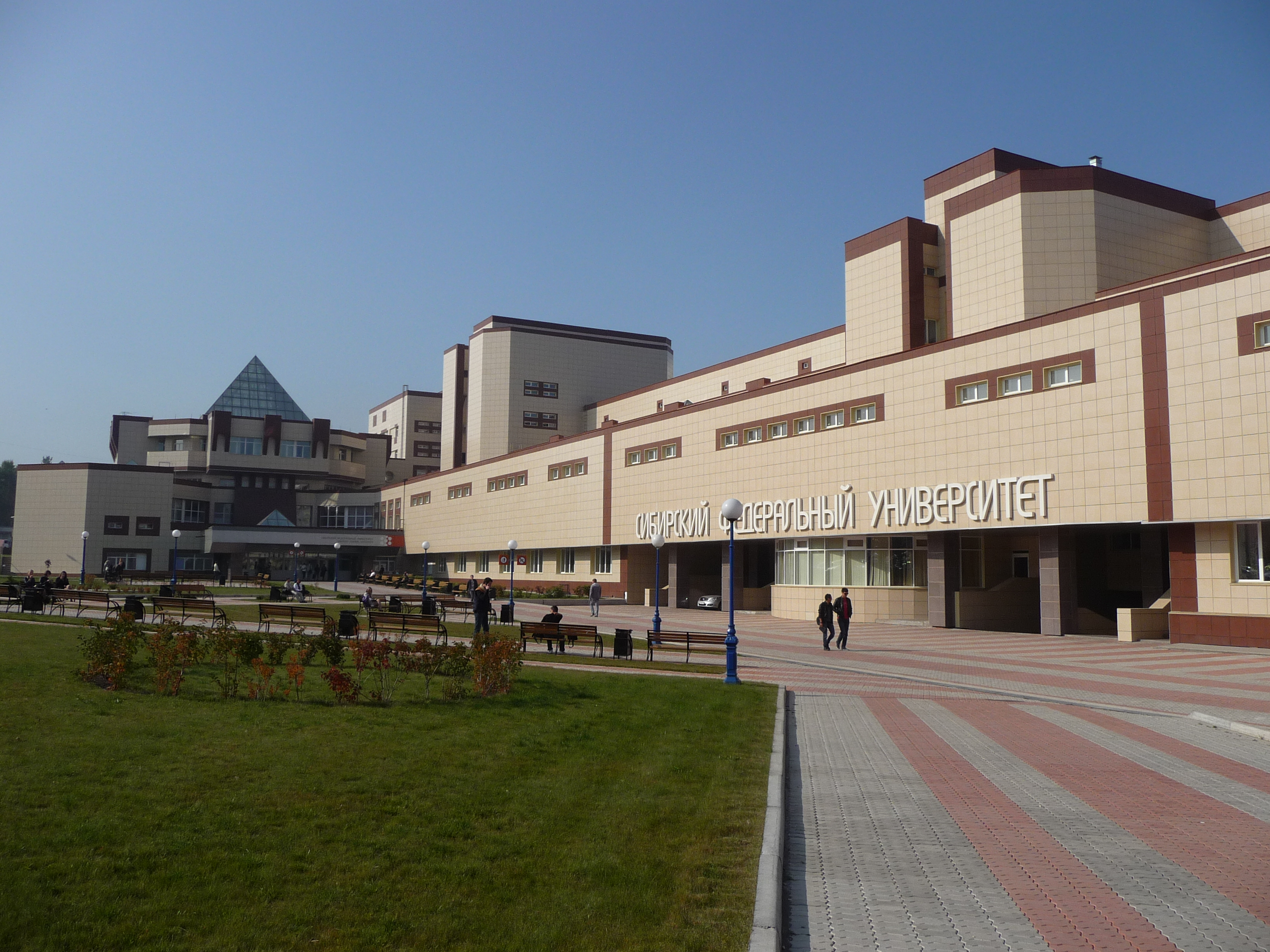 Сибирский Федеральный Университет (площадка №4), Красноярск